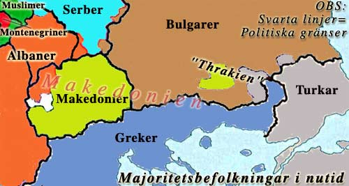 Egentillverkad karta för "Makedonien" , den historiska provinsen